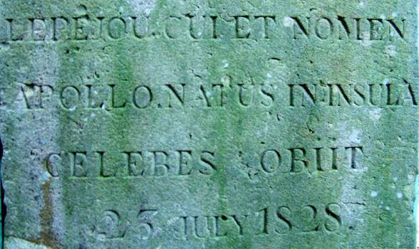 Tekst op de grafsteen van Lepejou.